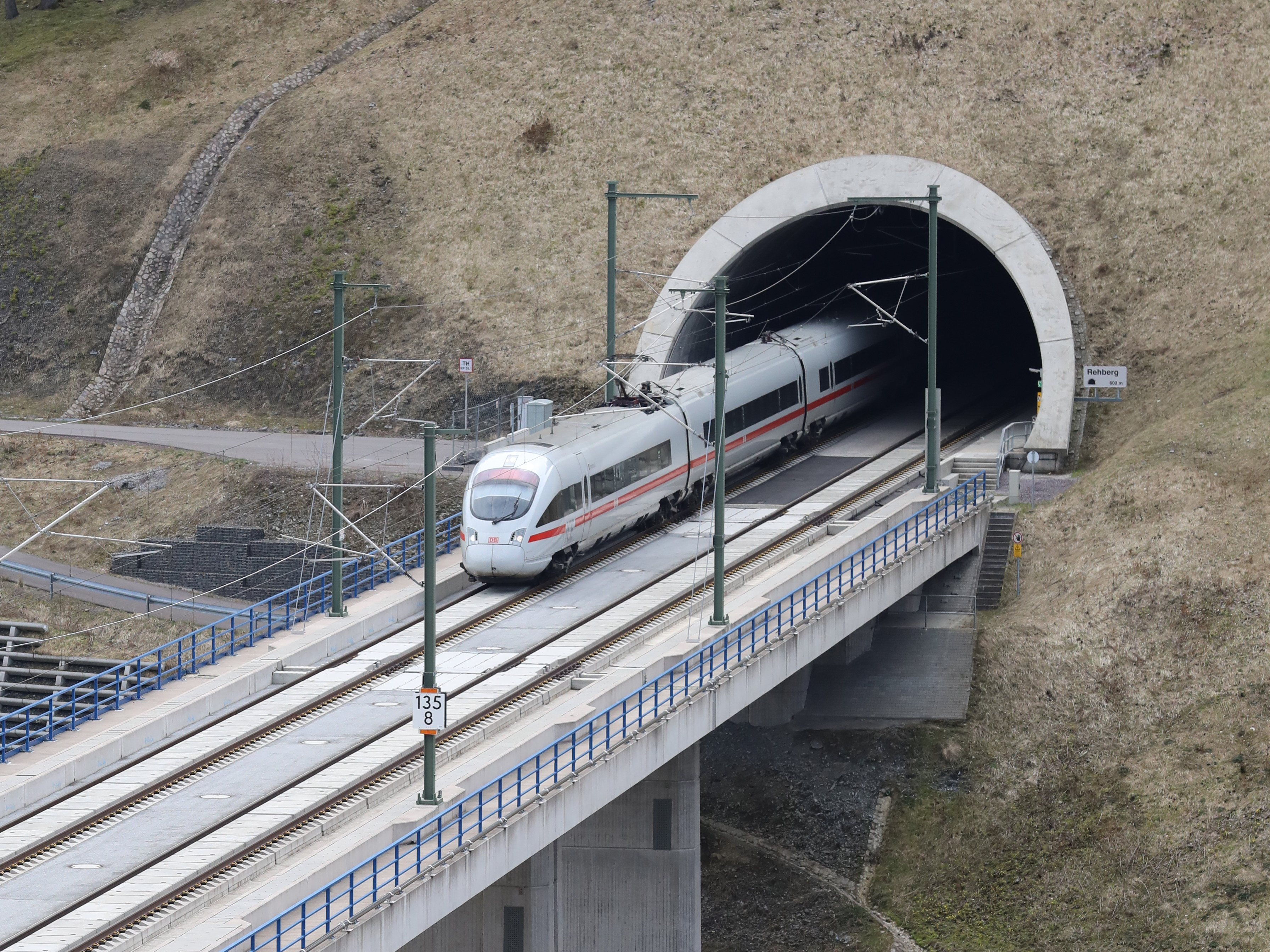 Tunnel Rehberg, Nordportal